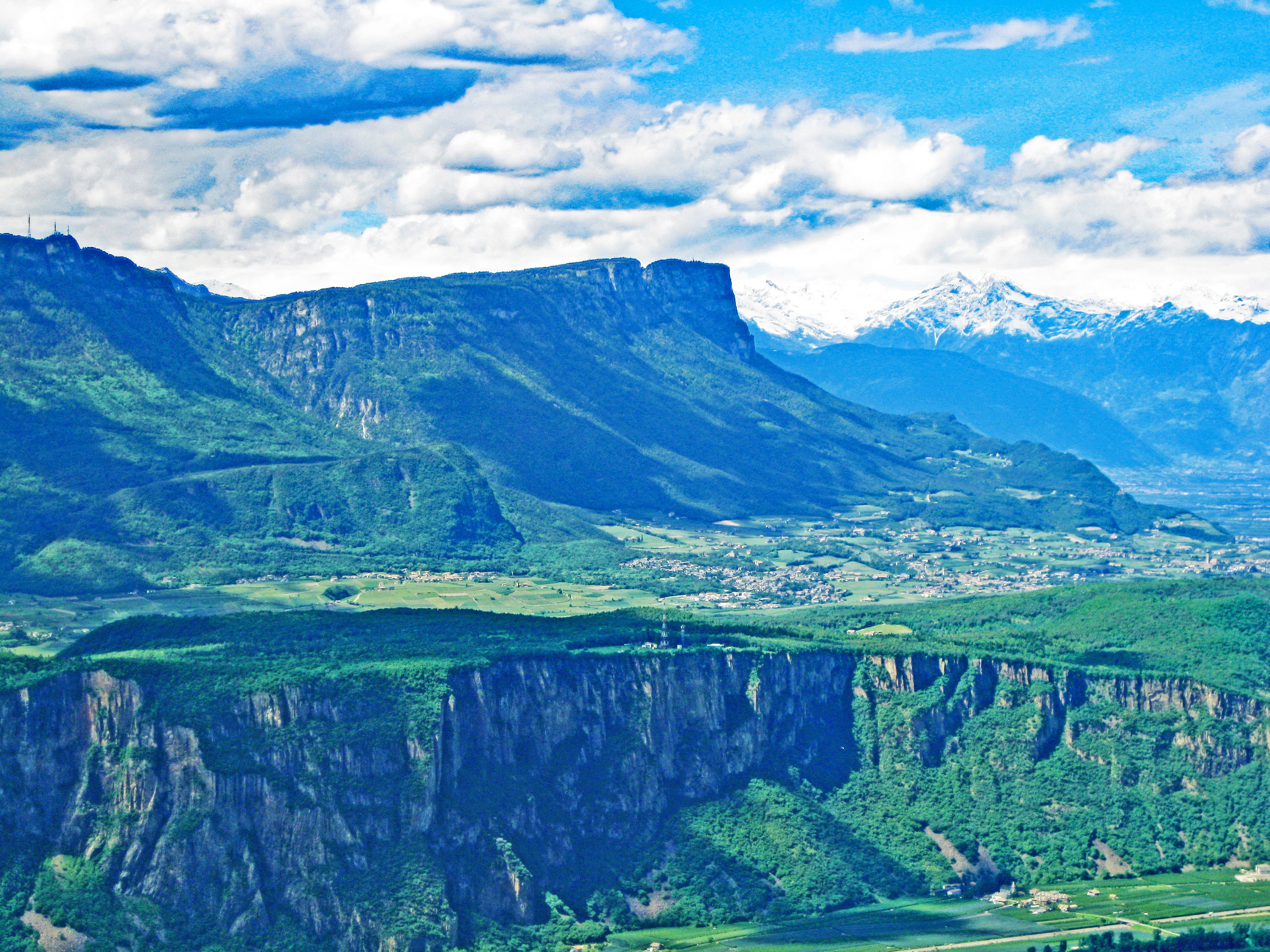 Der Gantkofel von Südosten (Rotwand) aus betrachtet, im Vordergrund die Abstürze des Mitterbergs, zwischen Mitterberg und Gantkofel das Überetsch mit Eppan